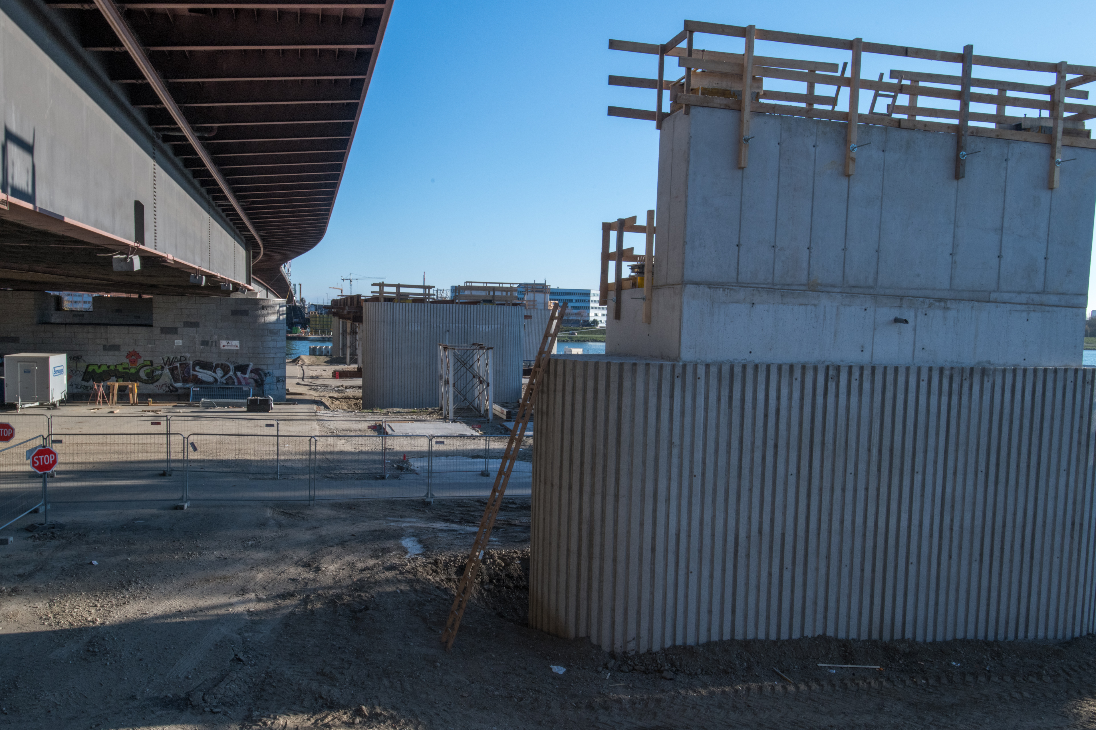 Errichtung von Bypass–Brücken westseitig der VOEST–Brücke